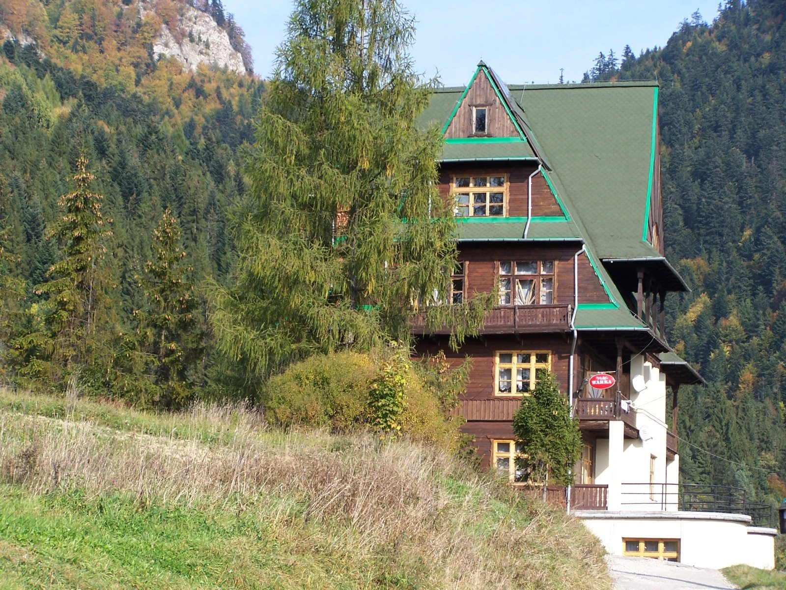 Schronisko PTTK Trzy Korony (Pieniny)